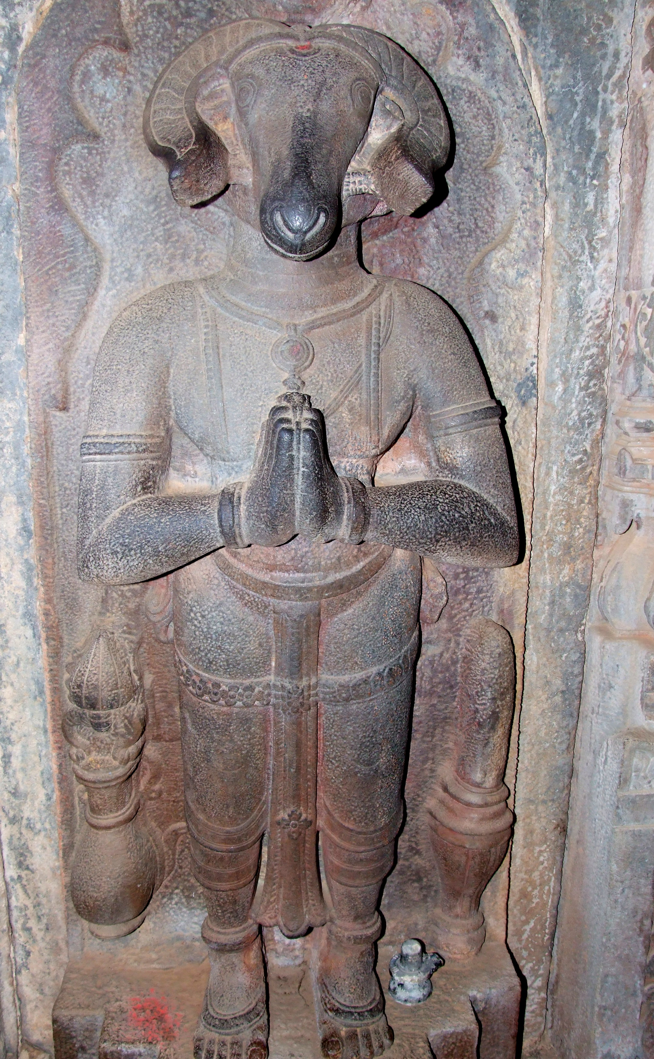 ಕನ್ನಡ: ಕೆಳದಿ ದೇವಸ್ಥಾನದಲ್ಲಿರುವ ದಕ್ಷಬ್ರಹ್ಮ